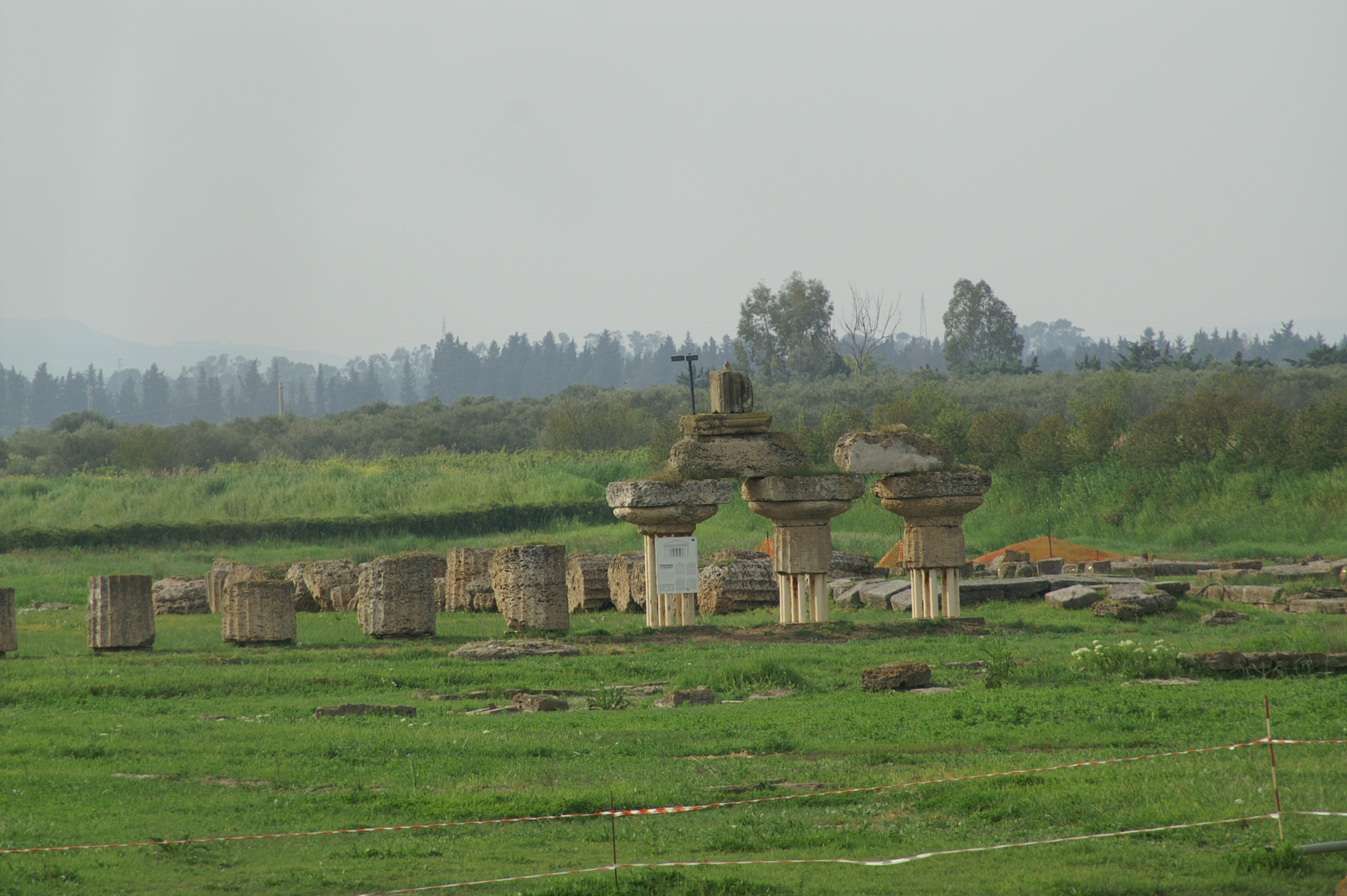 Montaponto: Tempel